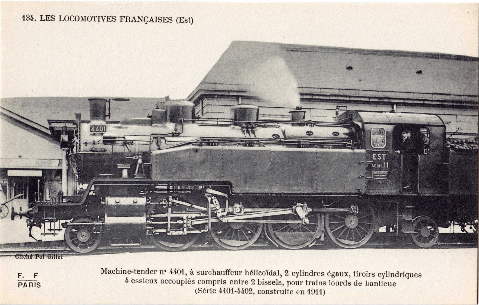 Carte postale ancienne éditée par FF à Paris, collection Les locomotives françaises (Est), n°134 : Machine-tender n°4401, à surchauffeur hélicoïdal, 2 cylindres égaux, tiroirs cylindriques, 4 essieux accouplés compris entre 2 bissels pour trains lourds de banlieue (série 4401-4402 construite en 1911), cliché Pol Gillet